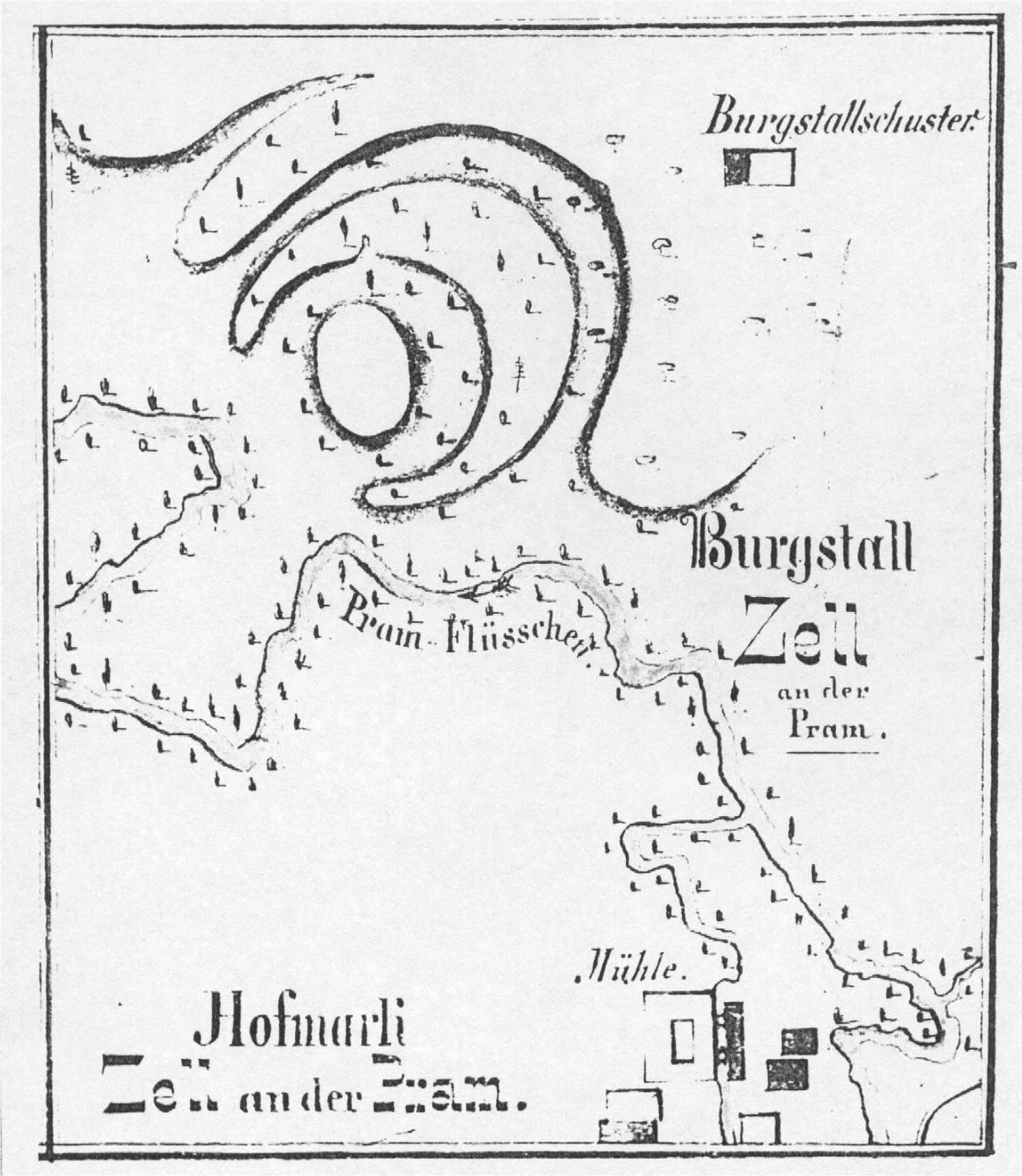 Karte des Burgstalls Zell an der Pram (nach Planskizze [Tab. F, Fig. 2] von Johann Ev. Lamprecht)